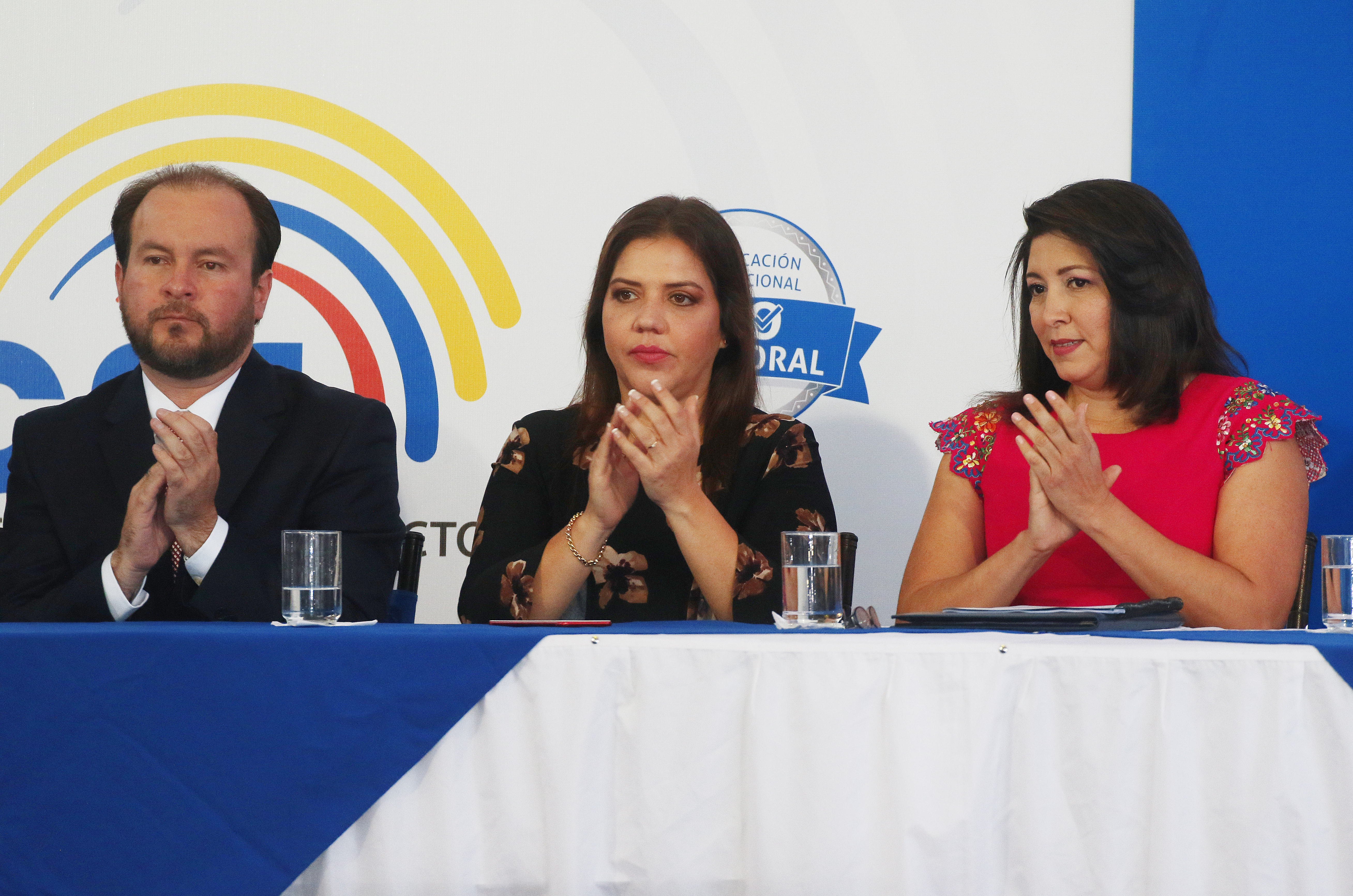 Quito, 04 de febrero de 2018 (Andes).- En una ceremonia que se desarrolló en Quito, las autoridades de Ecuador llamaron a más de 13 millones de ecuatorianos, entre ellos los que radican en el exterior, que están empadronados a sufragar en este plebiscito de iniciativa del Ejecutivo. En la gráfica de izq. a der. Paúl Salazar, consejero del CNE; María Alejandra Vicuña, Vicepresidenta de la República y Nubia Villacís, Presidenta del Consejo Nacional Electoral, CNE. ANDES/Micaela Ayala V. Quito, 04 de febrero de 2018 (Andes).- En una ceremonia que se desarrolló en Quito, las autoridades de Ecuador llamaron a más de 13 millones de ecuatorianos, entre ellos los que radican en el exterior, que están empadronados a sufragar en este plebiscito de iniciativa del Ejecutivo. En la gráfica de izq. a der. Paúl Salazar, consejero del CNE; María Alejandra Vicuña, Vicepresidenta de la República y Nubia Villacís, Presidenta del Consejo Nacional Electoral, CNE. ANDES/Micaela Ayala V.